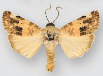 Acontia albifusa female